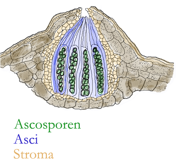 Perithezium.